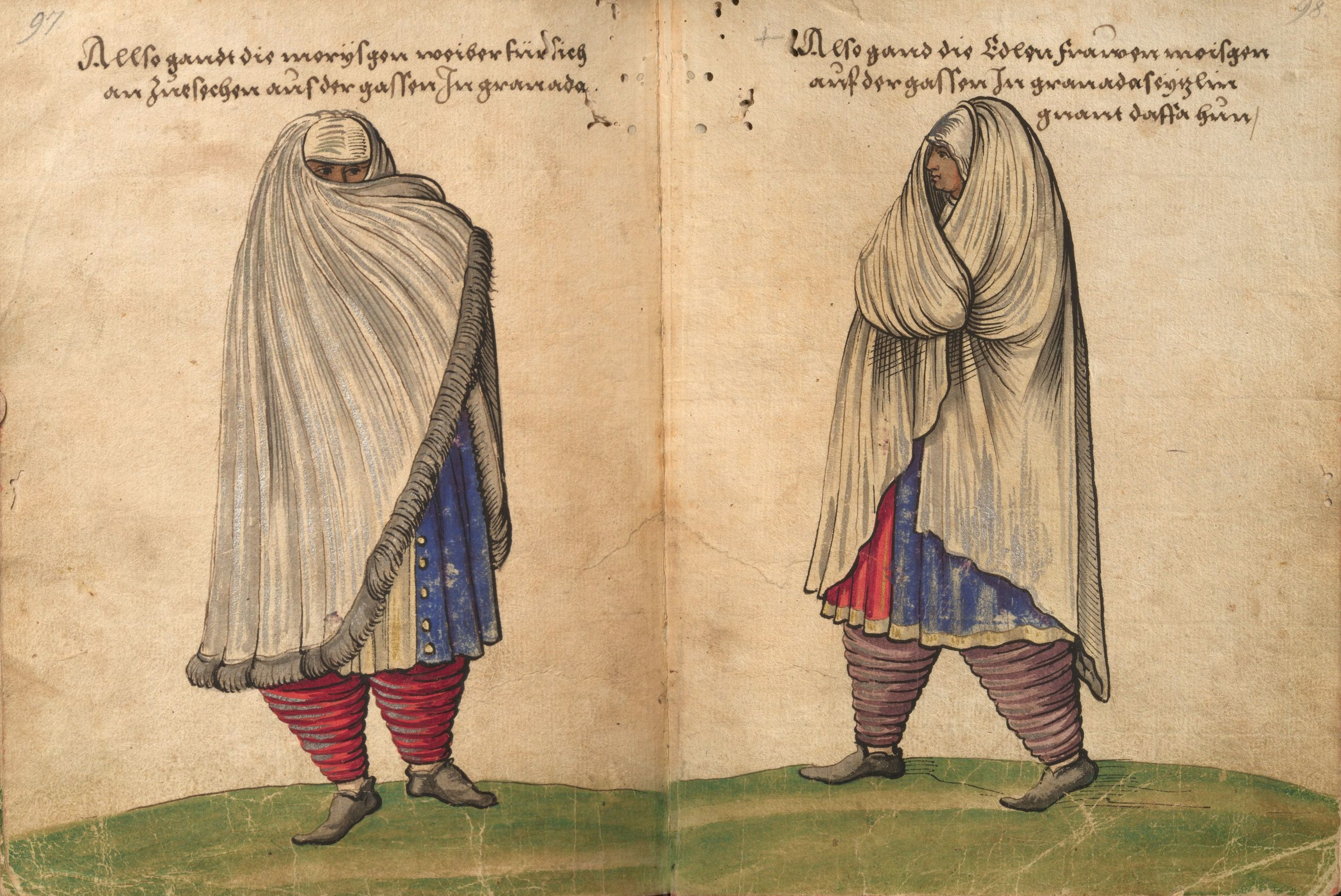 "Trachtenbuch" des Christoph Weiditz, Germanisches Nationalmuseum Nürnberg, Hs. 22474. Bl. 97–98 Haustracht der Morisken-Frauen in Granada.